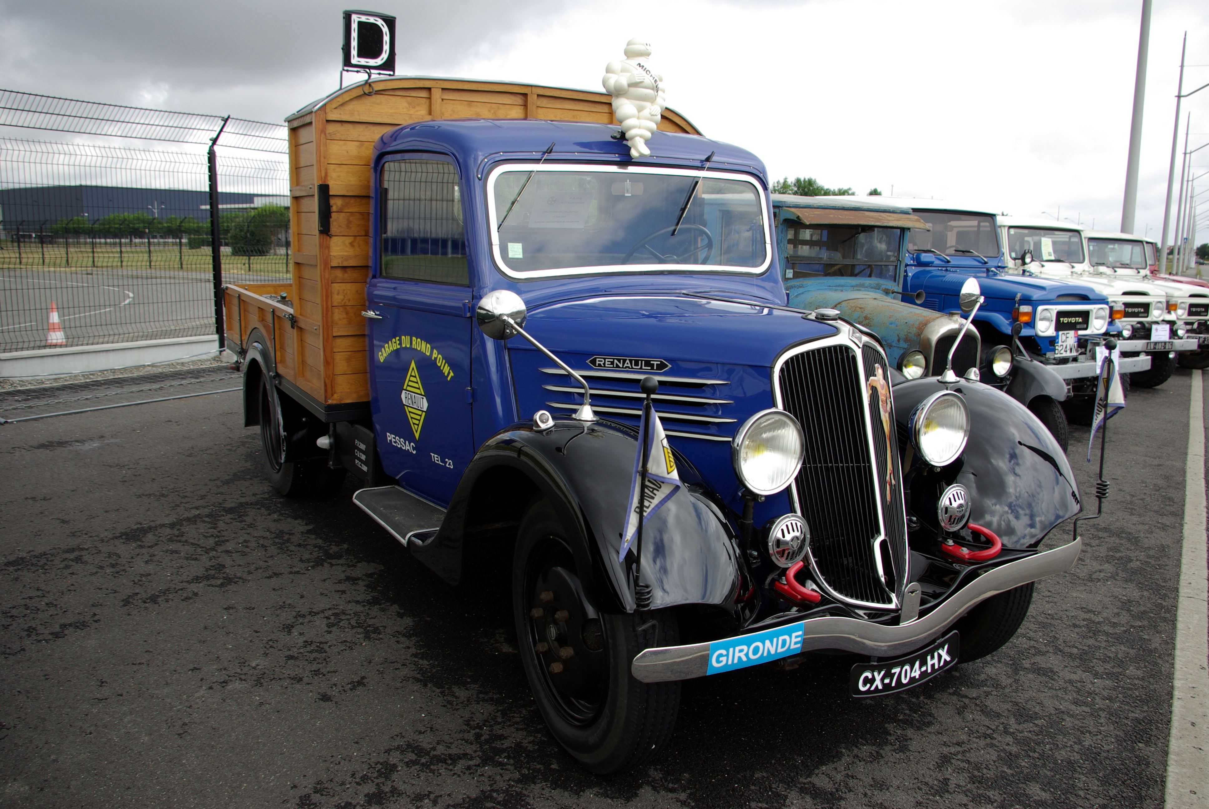 Renault ACZ1